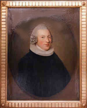 Jens Winther Bentzon i sin Præstekjole